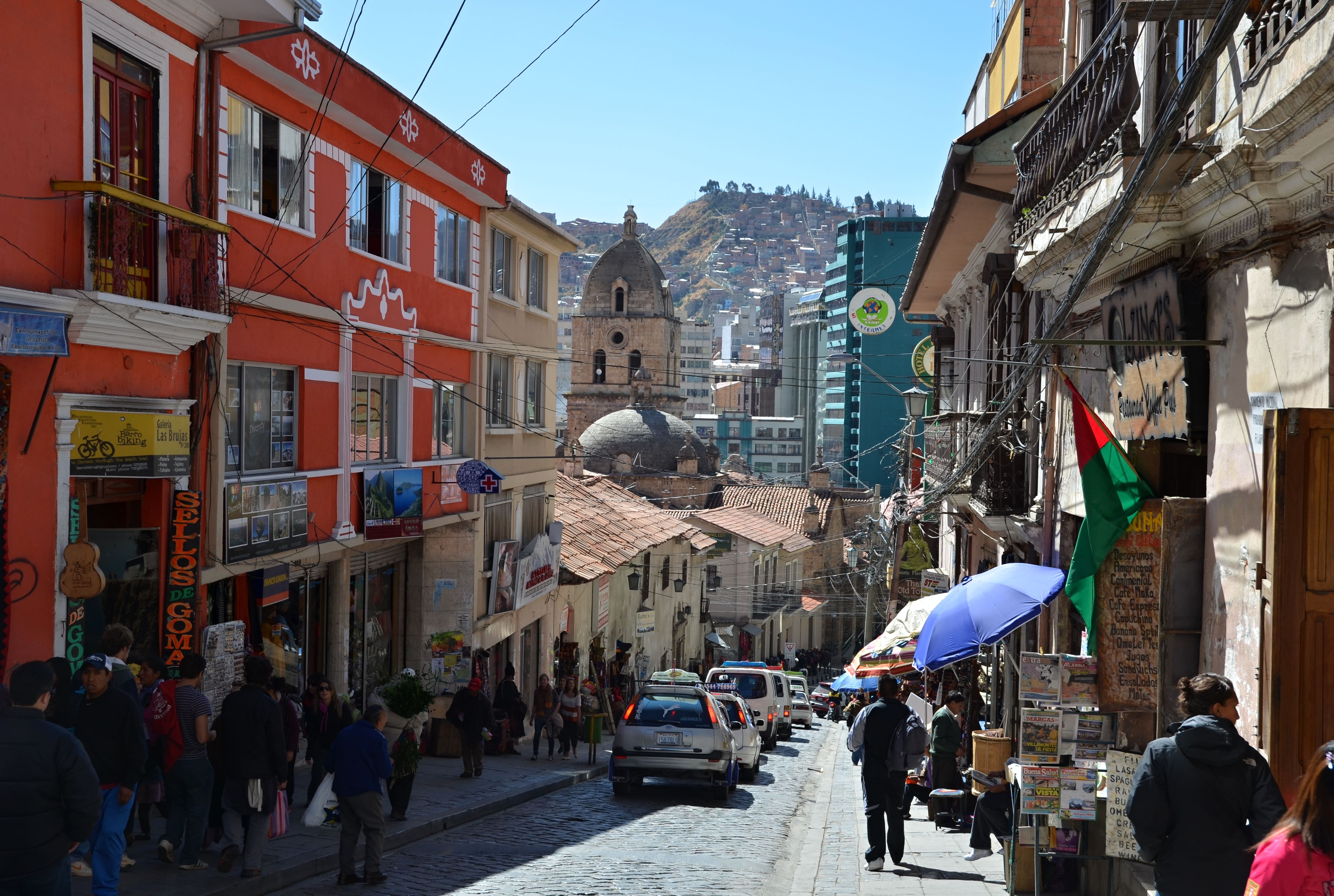 La Paz a katedrála